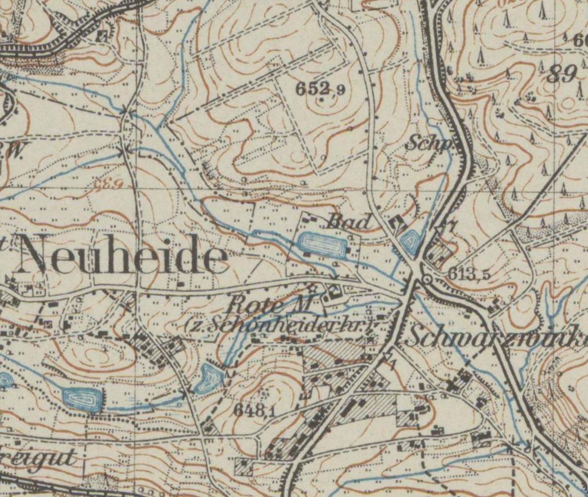 Ausschnitt Neuheide, Schwarzwinkel, Rote Mühle und Umgebung aus Topographische Karte 1:25.000 (Messtischblatt) Blatt 5441-Schneeberg- aus dem Jahr 1942 (Link zum Kartenblatt und zur Kartenbeschreibung bei der Sächsischen Staats- und Universitätsbibliothek Dresden)